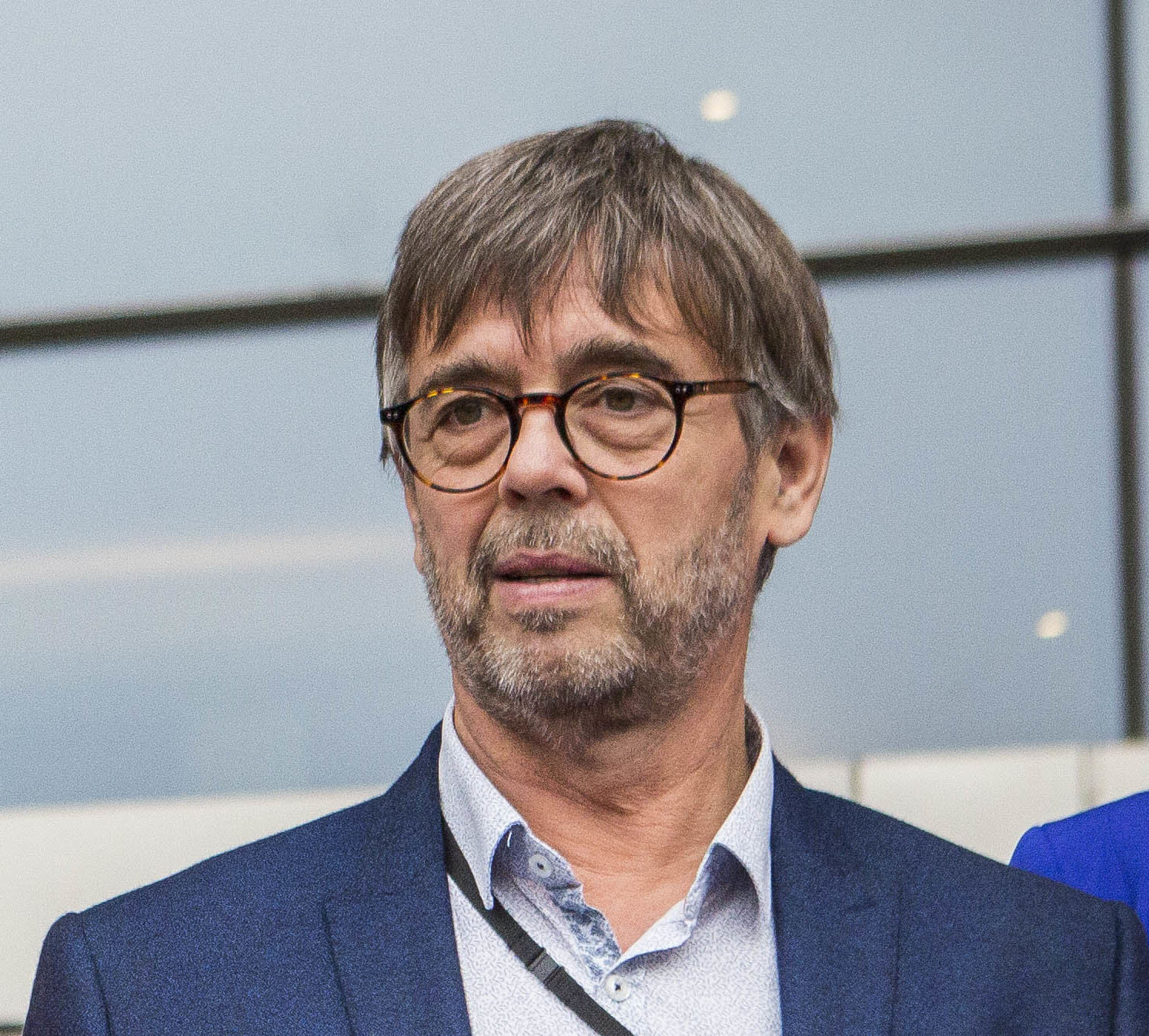 F70A8153